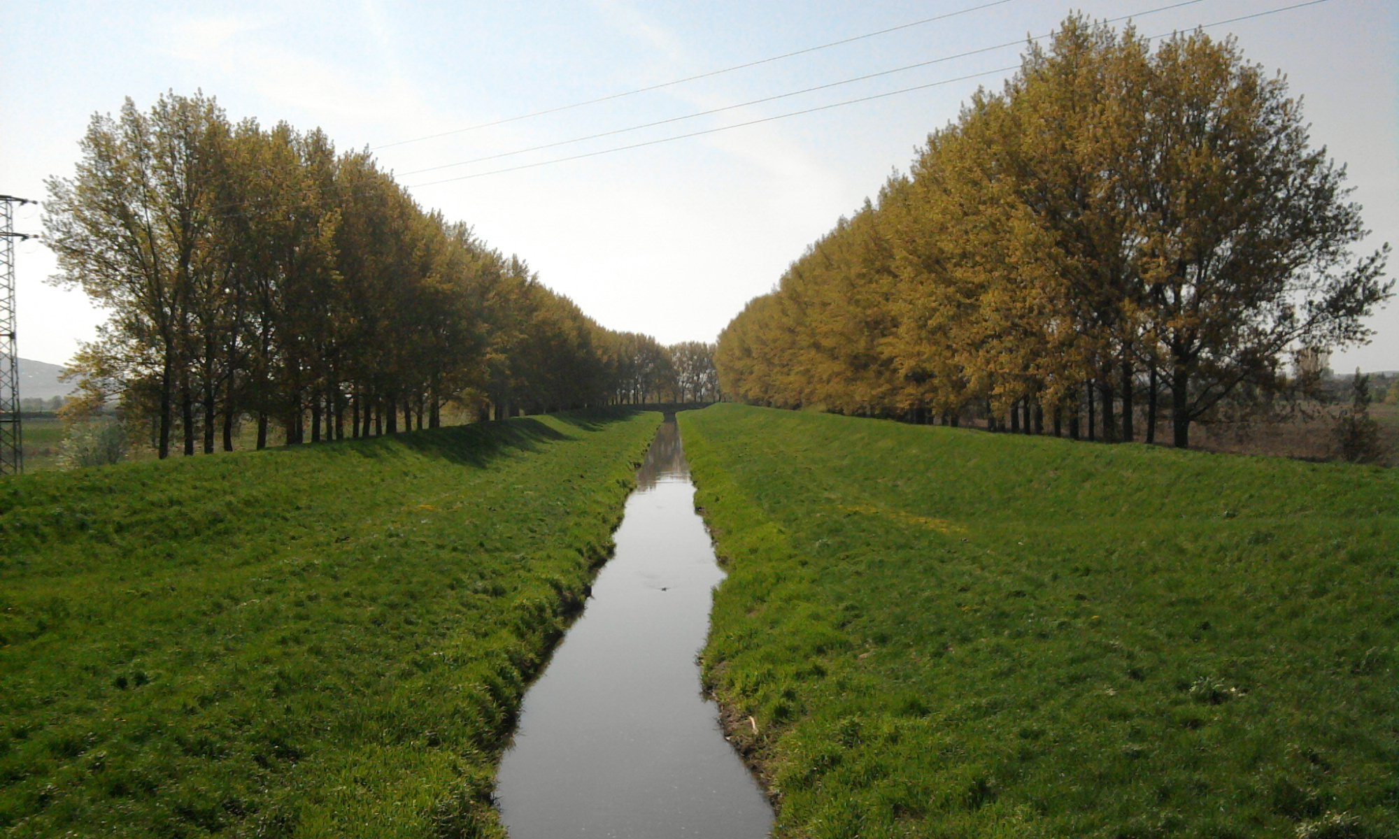 potok Radošinka v obci Zbehy